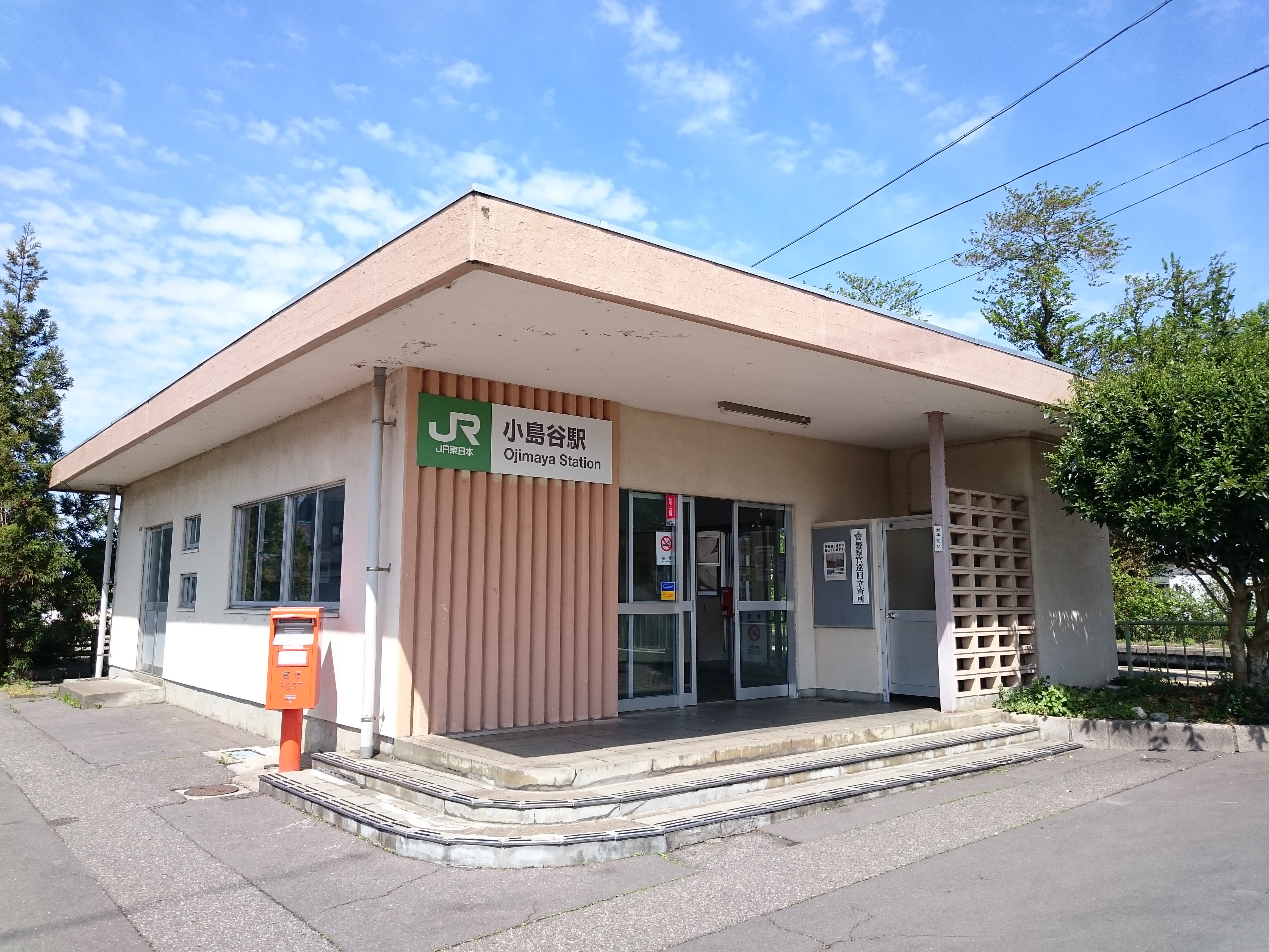 小島谷駅の駅舎外観